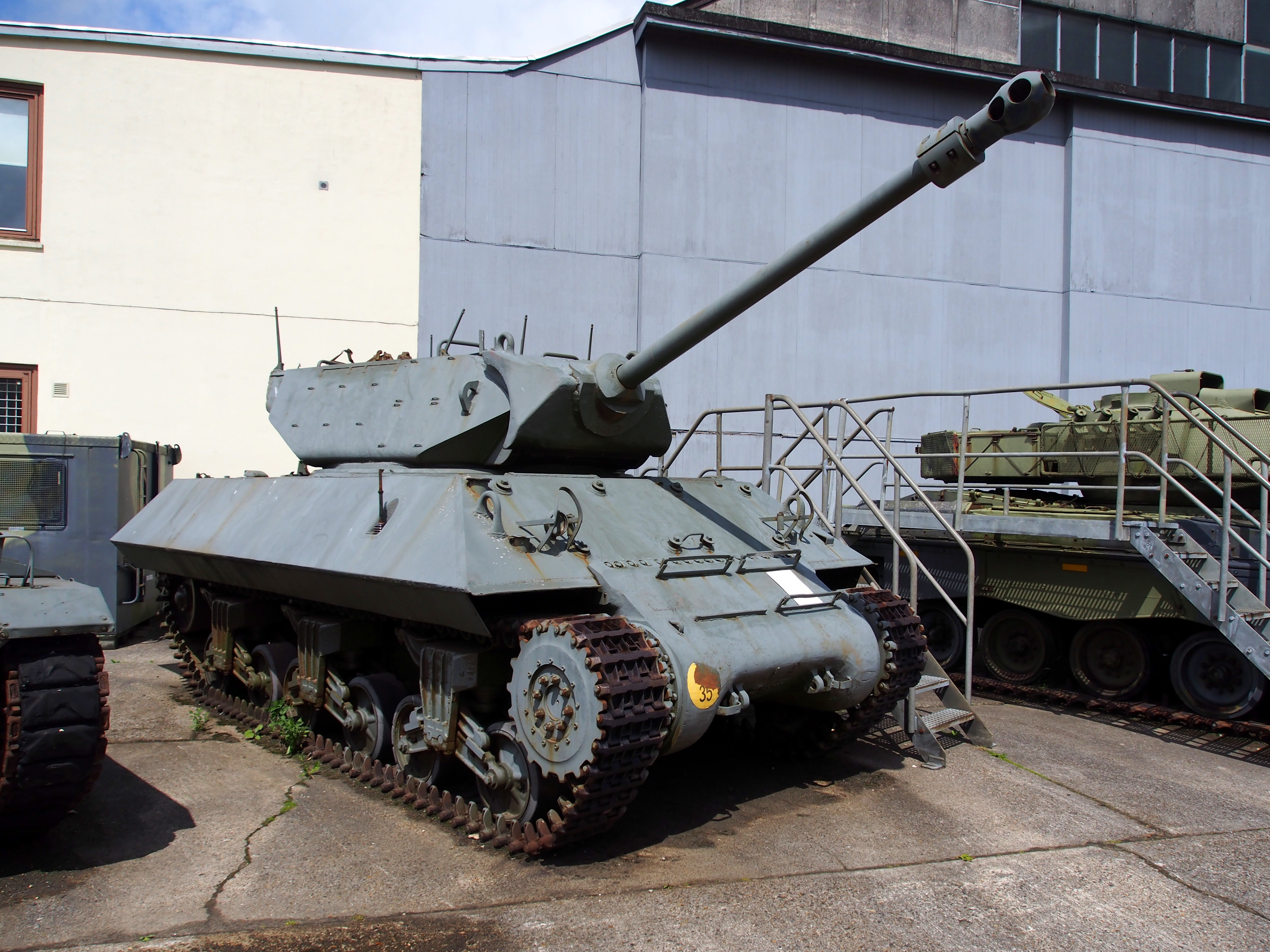 Photographed at Aalborg, Denmark.